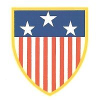 Insignia, CS-Organisation (Sholder and Helmet Badge)